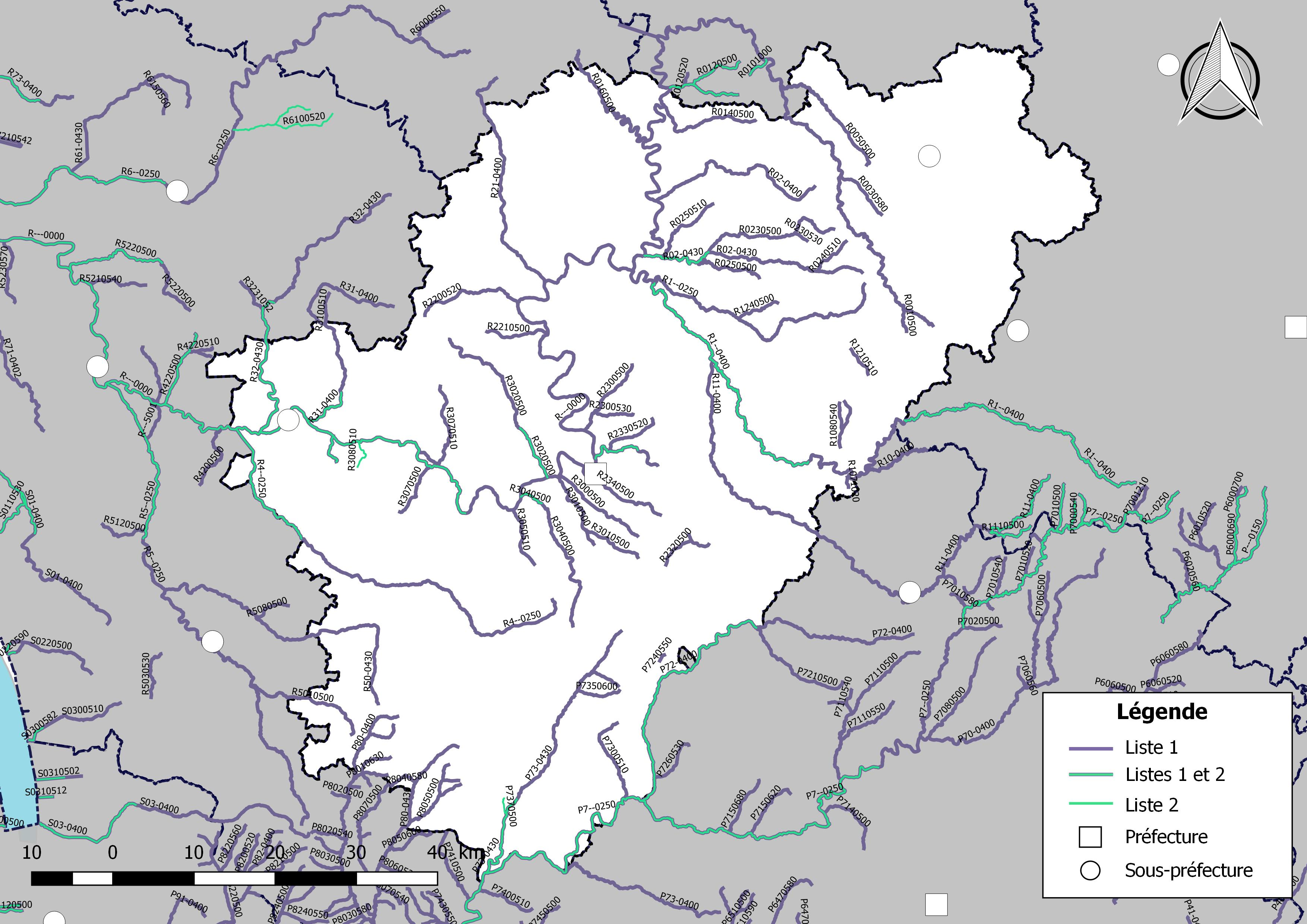 Classement des cours d'eau du département de la Charente (France) au titre de la continuité écologique (article L214.17 I du Code de l'environnement).